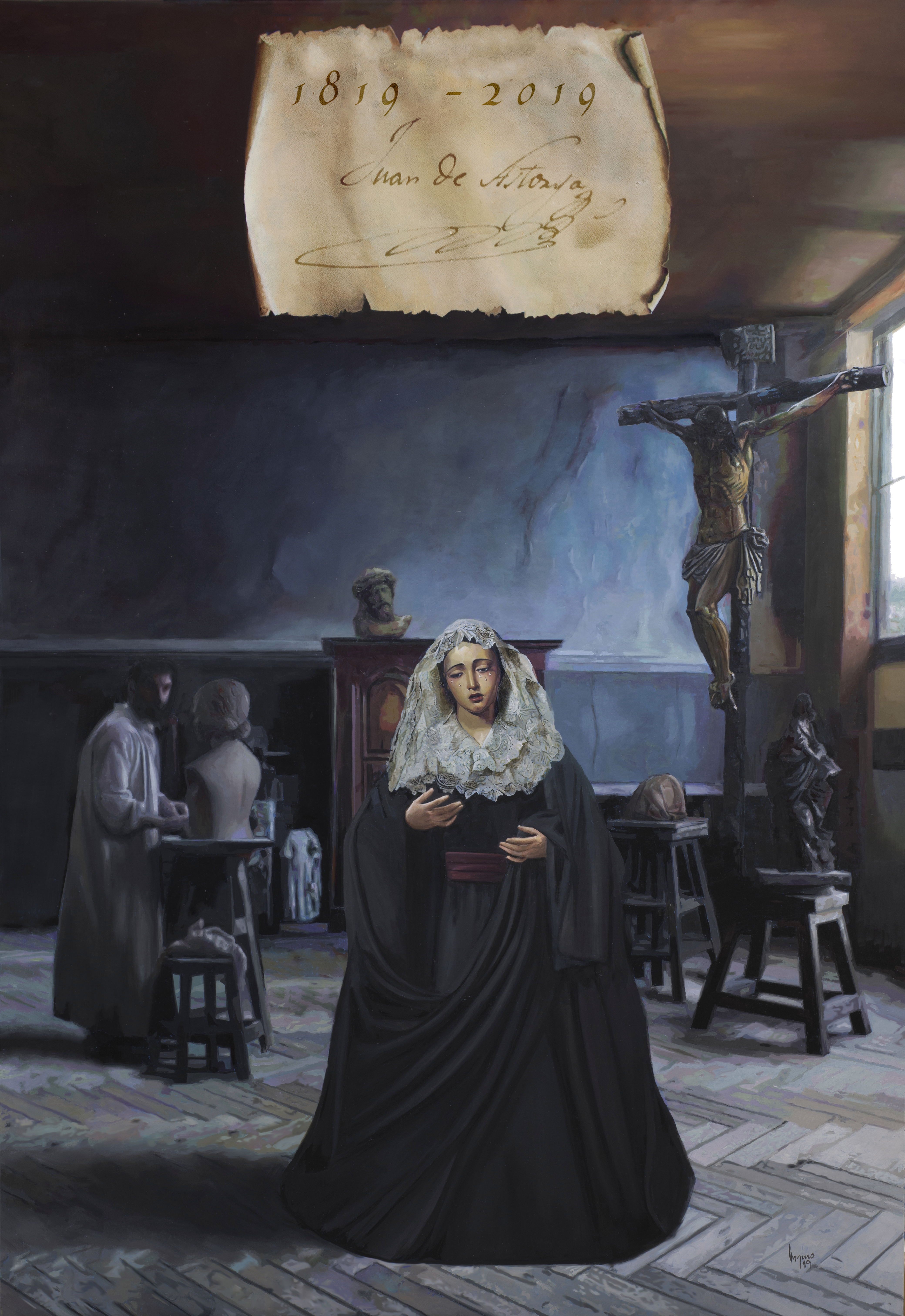 Juan de Astorga en su taller tras terminar la talla de la Esperanza de la Trinidad. Este cartel es obra de Fernando Vaquero realizado con motivo del 200 aniversario de la hechura de la Esperanza de la Trinidad